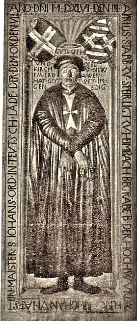 Steinplatte in der Kirche von Heitersheim mit einer Abbildung des Großpriors der deutschen Johanniter, Johann von Hattstein (1447-1546)